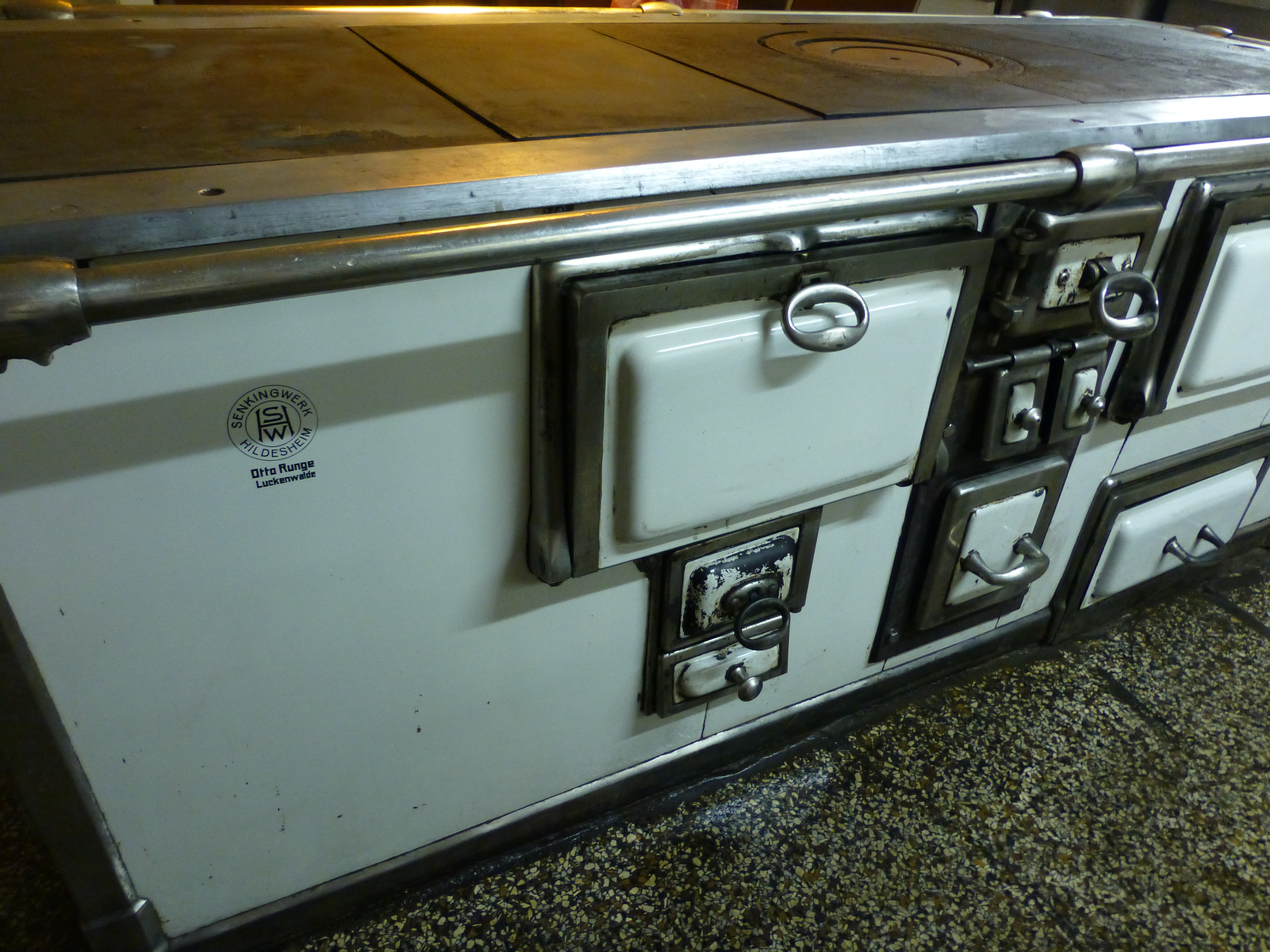 Herd in Dobbrikow, Brandenburg von 1929. Haus am Bauernsee - ehemalige Gaststätte zur Linde.